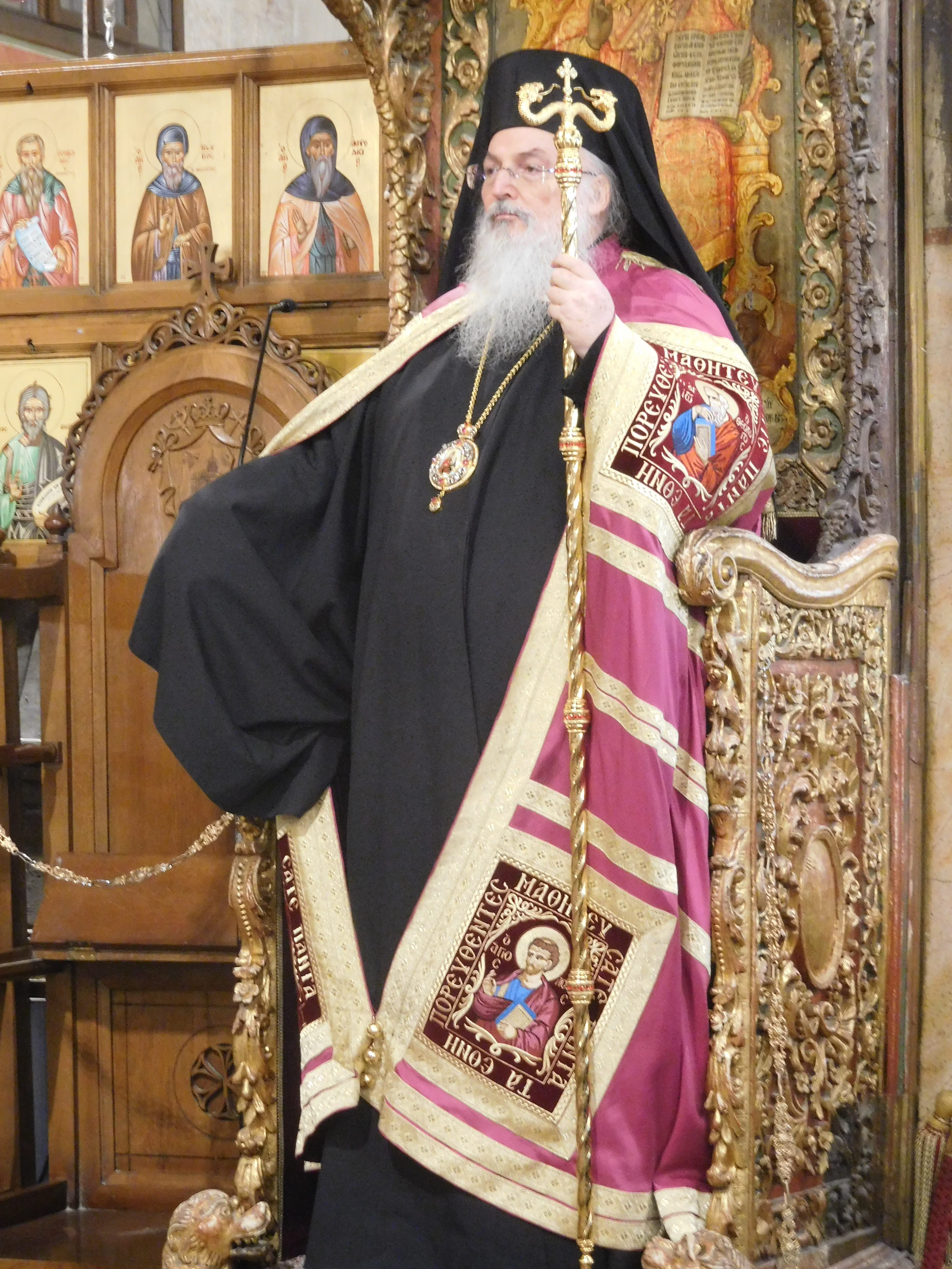 Архиепископ Иорданский Феофилакт (Георгиадис) (Иерусалимская православная церковь)